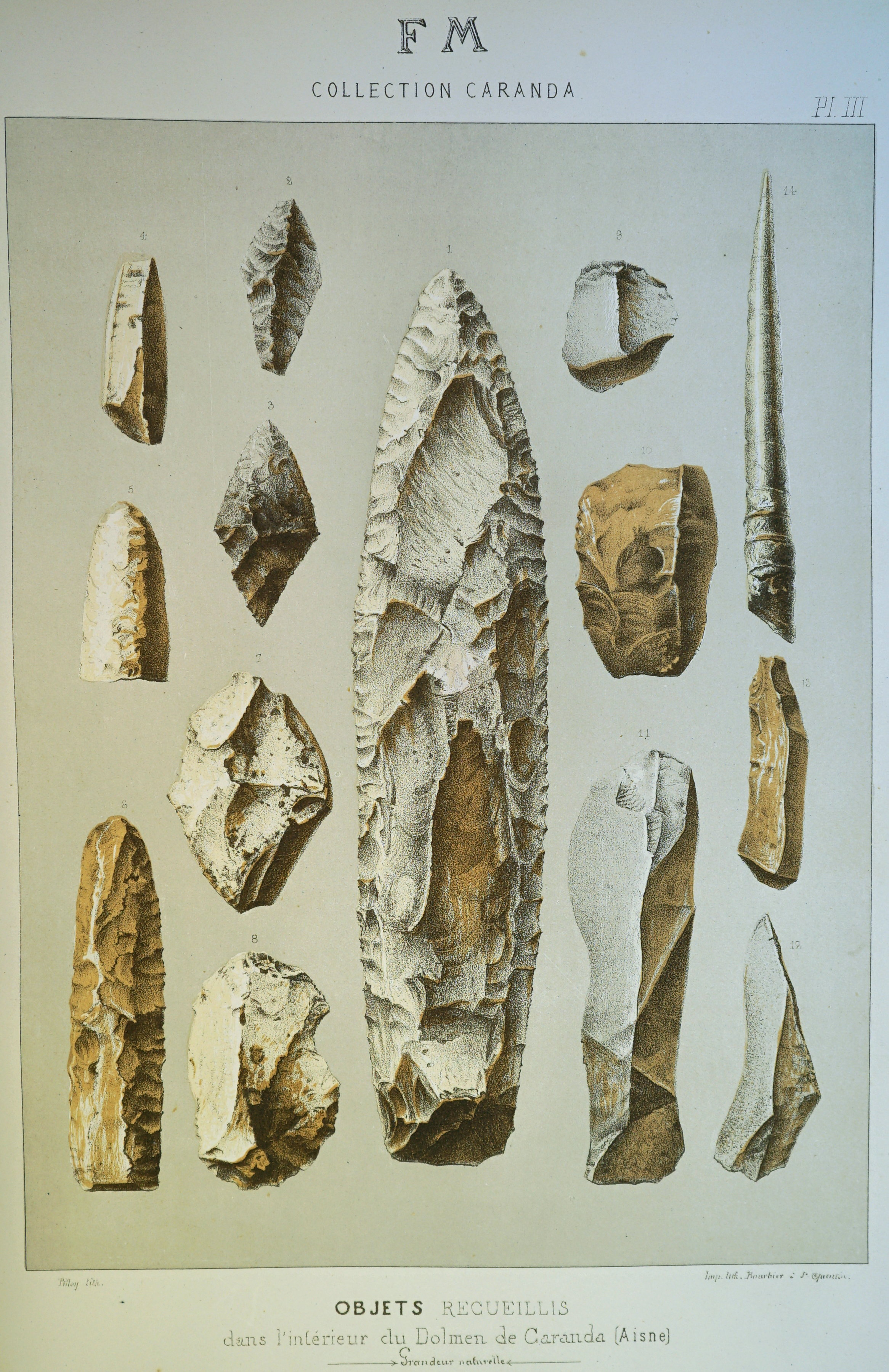 dessin de Pilloy des fouilles de Frédéric Moreau.